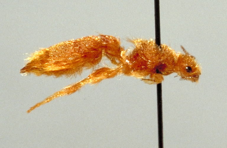 Apterogyna schultzei female (Namibia) Bradynobaenidae